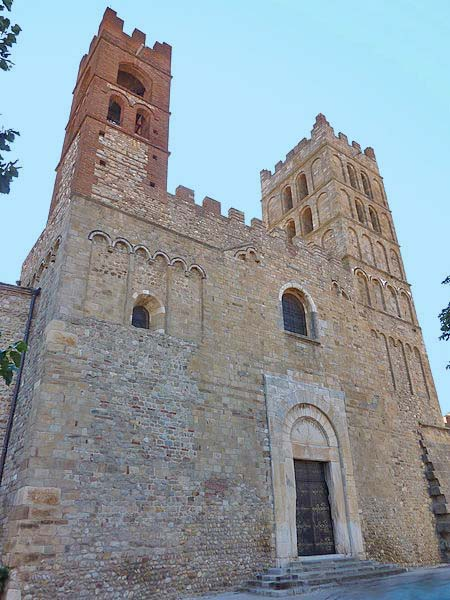 Francais: Elne le portal de la cathédrale Sainte-Eulalie-rt-Sainta-Julie